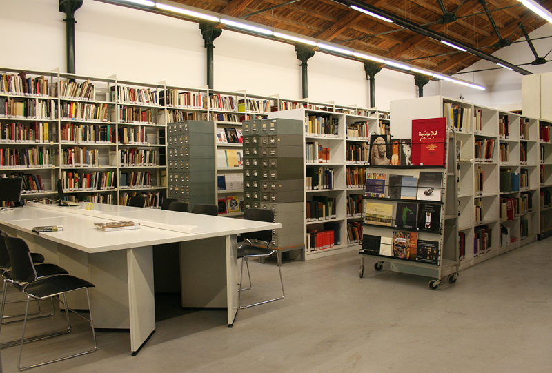 ΕΣΩΤΕΡΙΚΗ ΑΠΟΨΗ ΤΗΣ ΒΙΒΛΙΟΘΗΚΗΣ ΤΗΣ ΕΘΝΙΚΗΣ ΠΙΝΑΚΟΘΗΚΗΣ ΣΤΟ ΓΟΥΔΙ